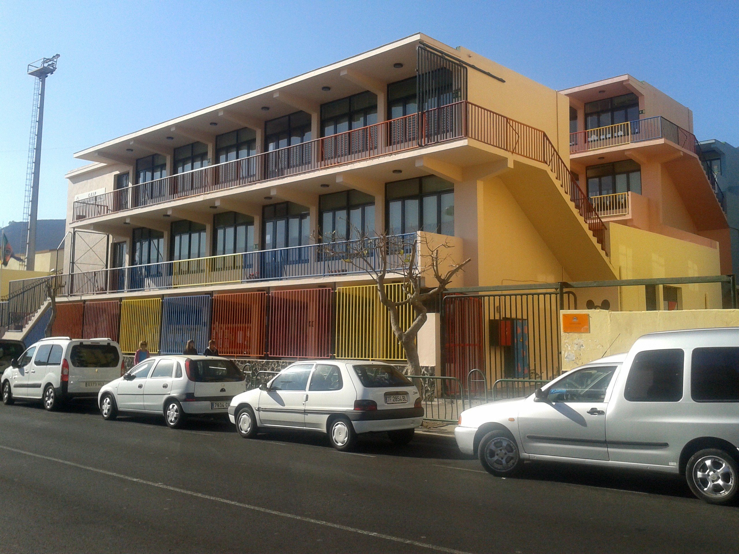 Colegio XXV Años de Paz de Los Llanos de AridaneUnknown